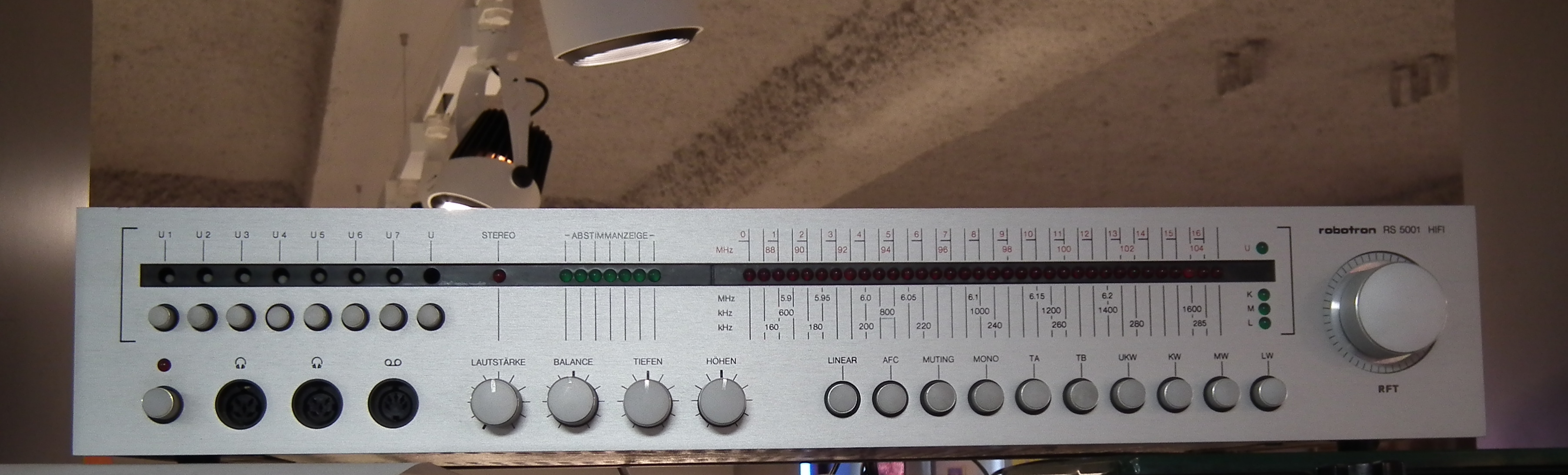 Dresden - Die Welt der DDR